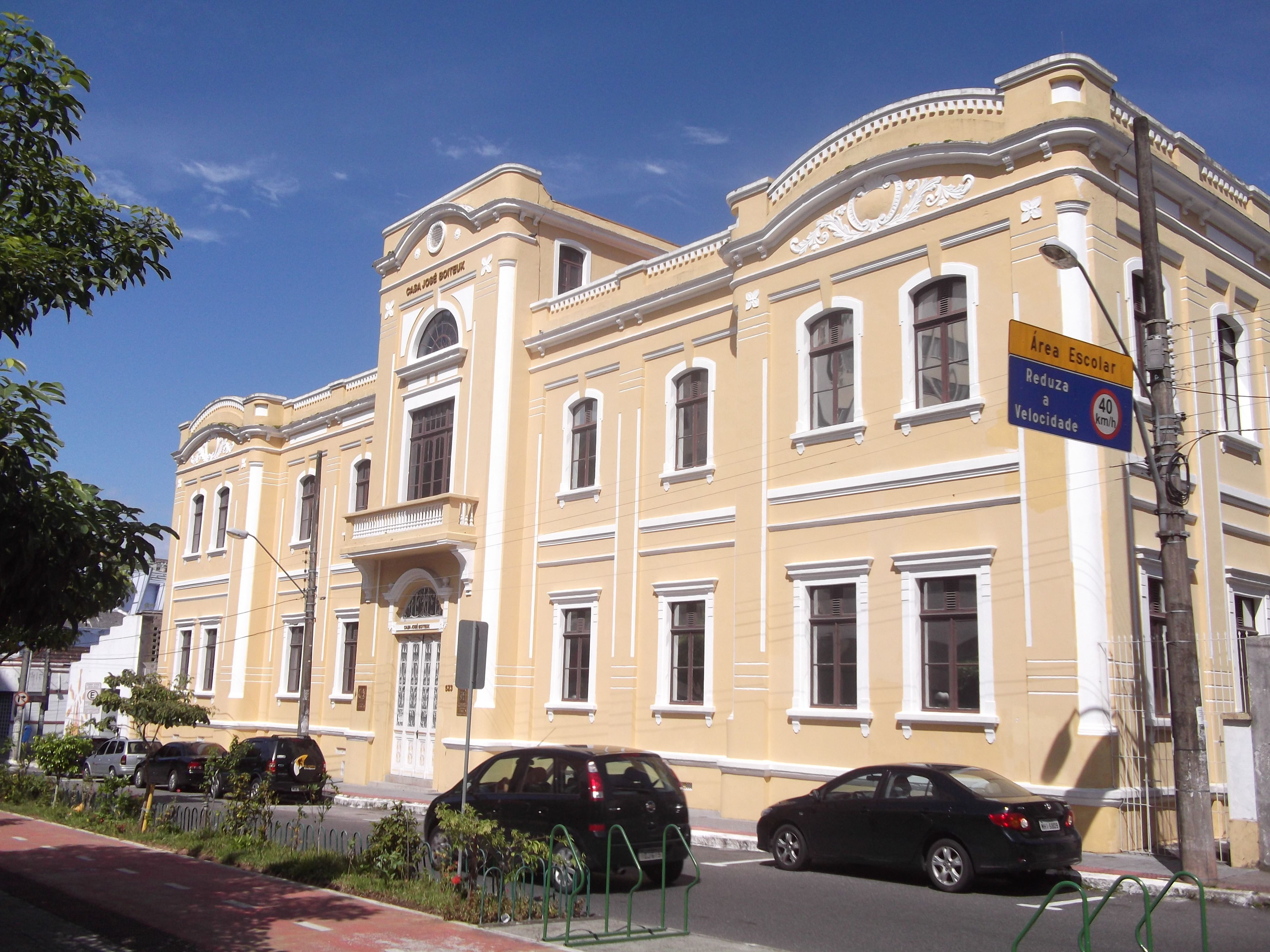 Casa José Boiteux, Florianópolis, Brasil